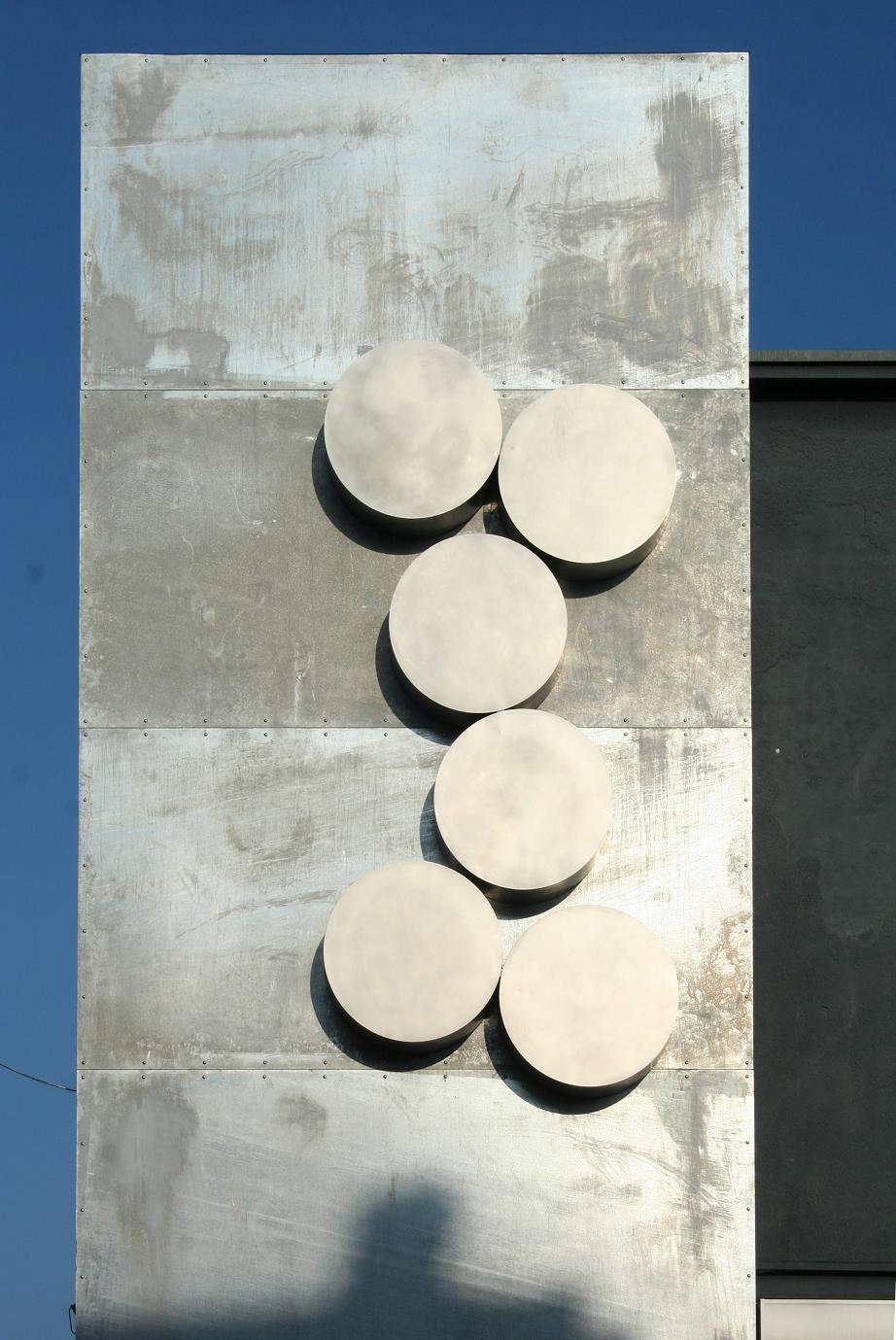 Großkinetik am Tanzhaus NRW in Düsseldorf, urspr. Signal-Iduna Haus.